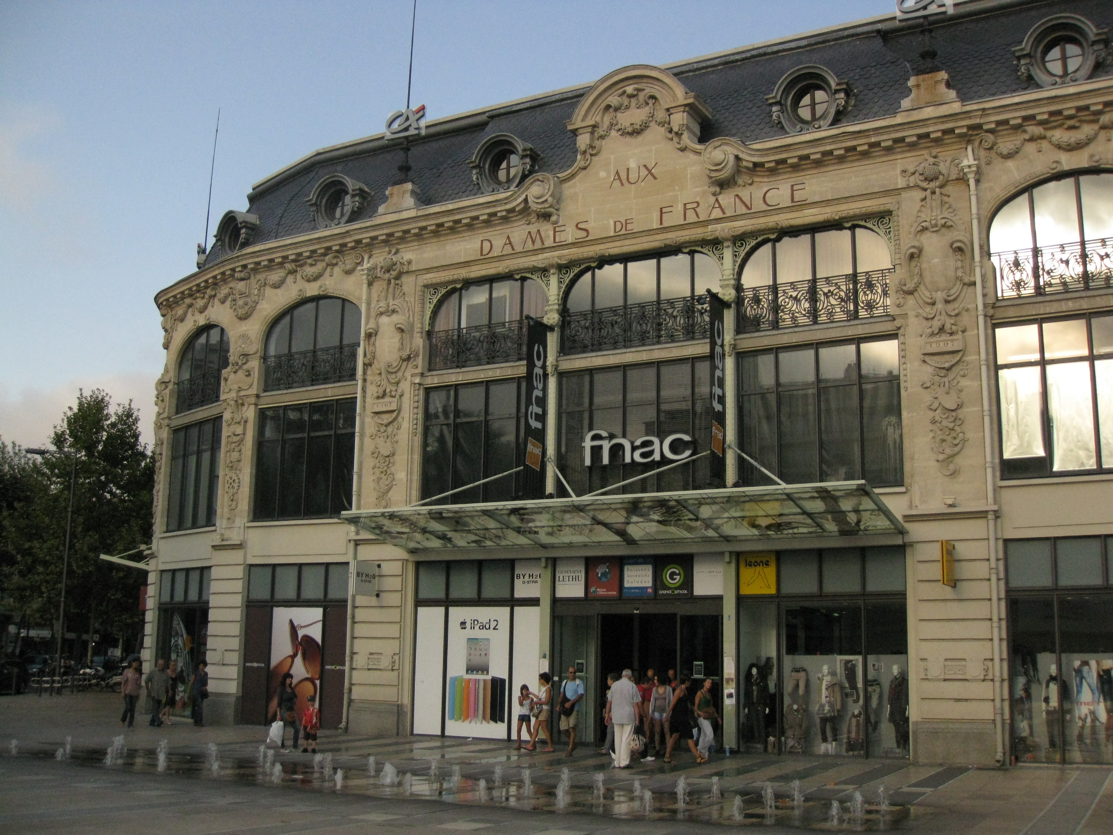 Antic magatzem Aux Dames de France, a la plaça de Catalunya de Perpinyà, avui FNAC